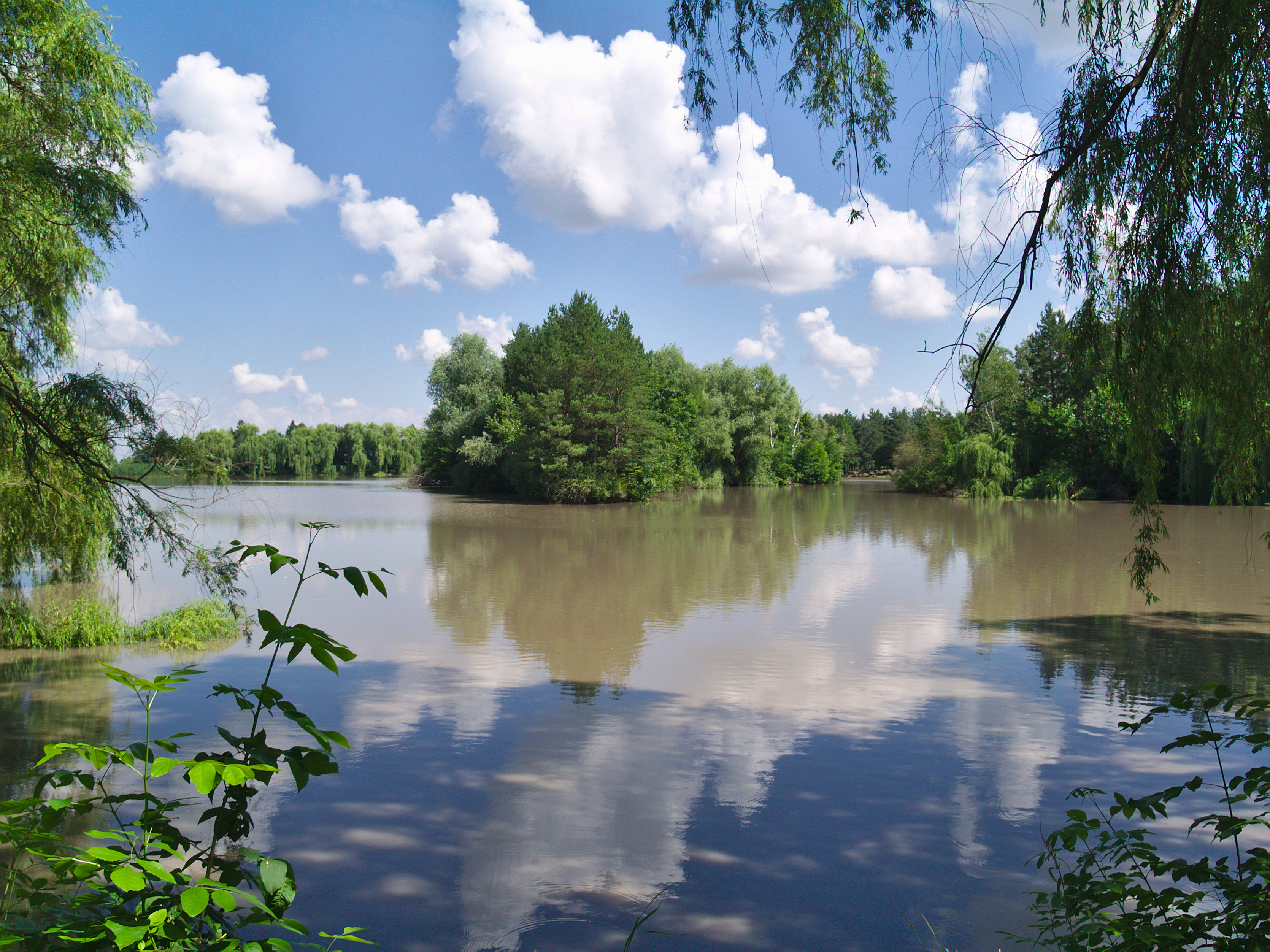 Гончарский дендрологический парк им. П.В. Букреева: Гончарка, Гиагинский район, Адыгея This image is related to the protected area of Russia number 0120003